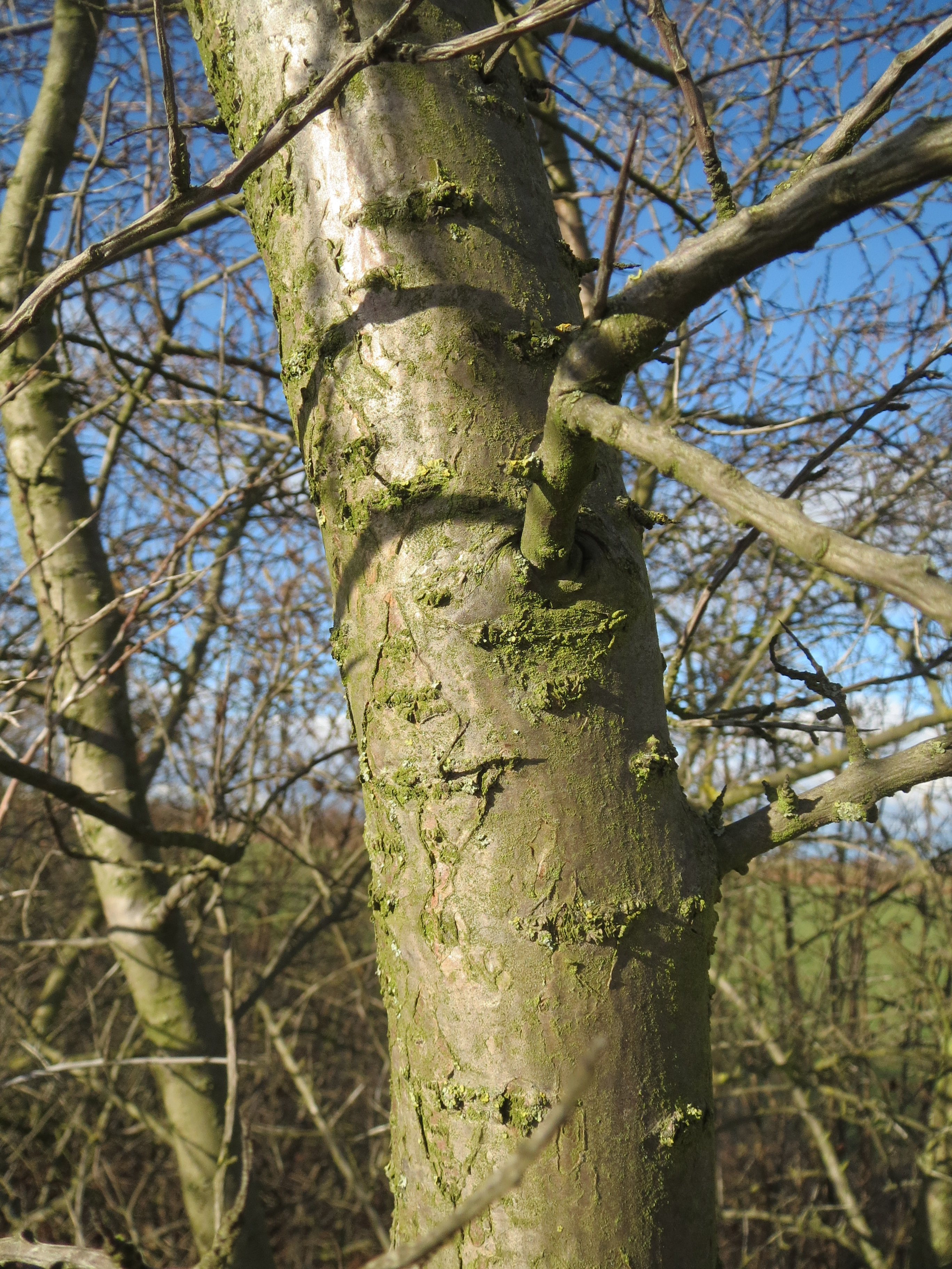 Sanddorn (Hippophae rhamnoides) bei Neulußheim